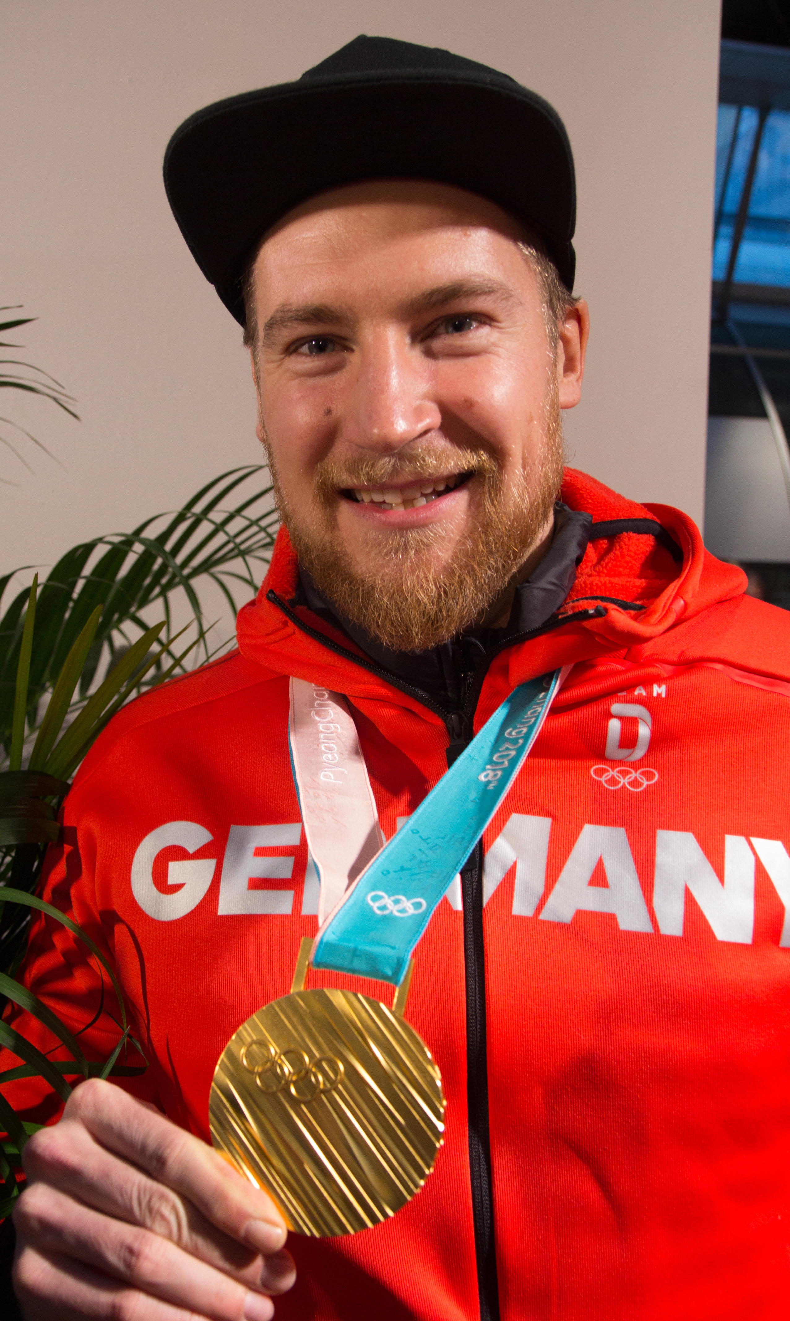 Ankunft der deutschen Olympiamannschaft am 26. Februar 2018 mit Flug LH713 auf dem Frankfurter Flughafen.